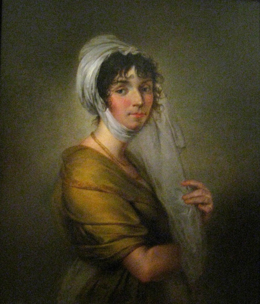 Прасковья Ковалева. // Выставка "Павел I" в музее Царицыно, 2011